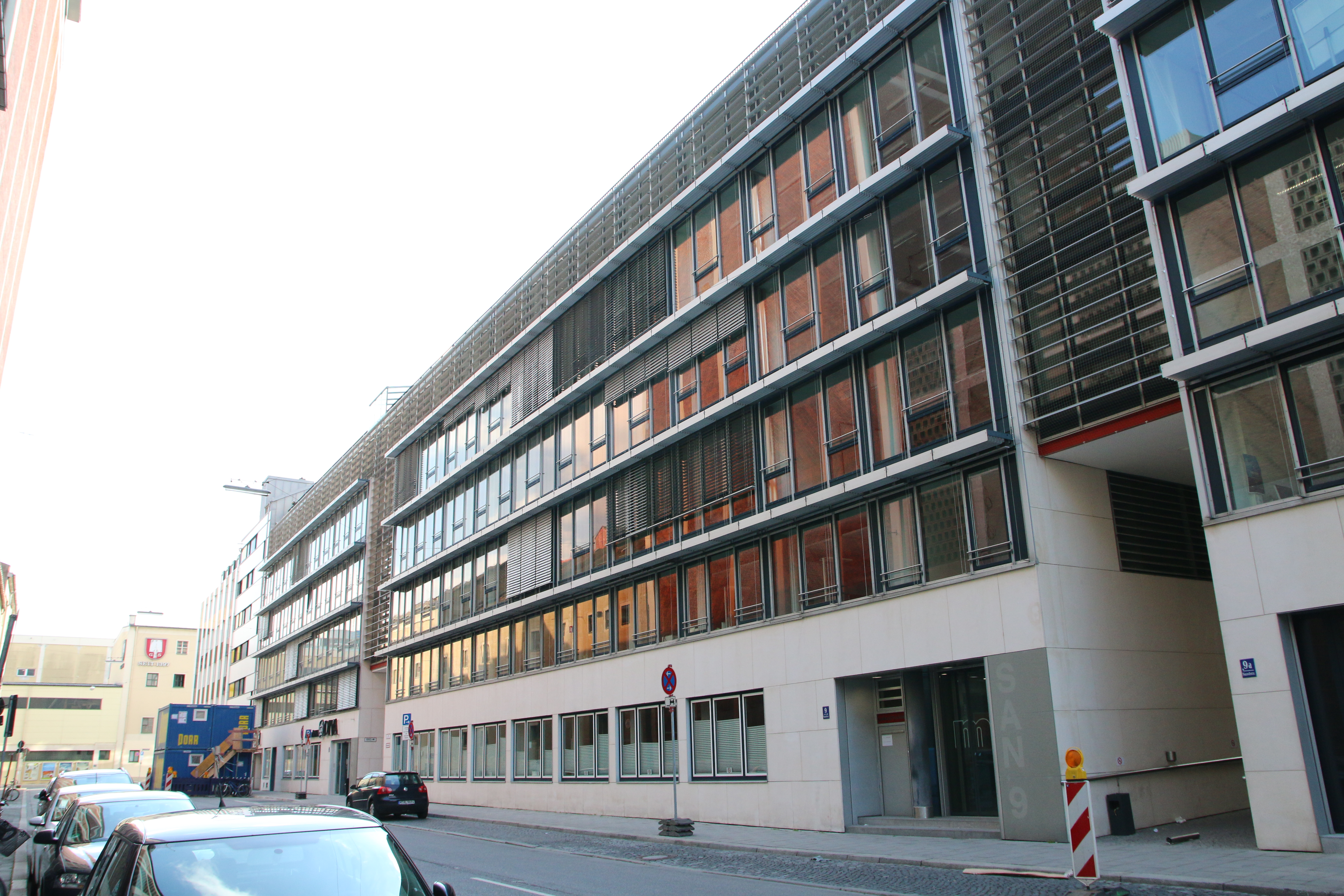 Die Sandstraße 9 in München, aktueller Sitz der Macromedia Hochschule.